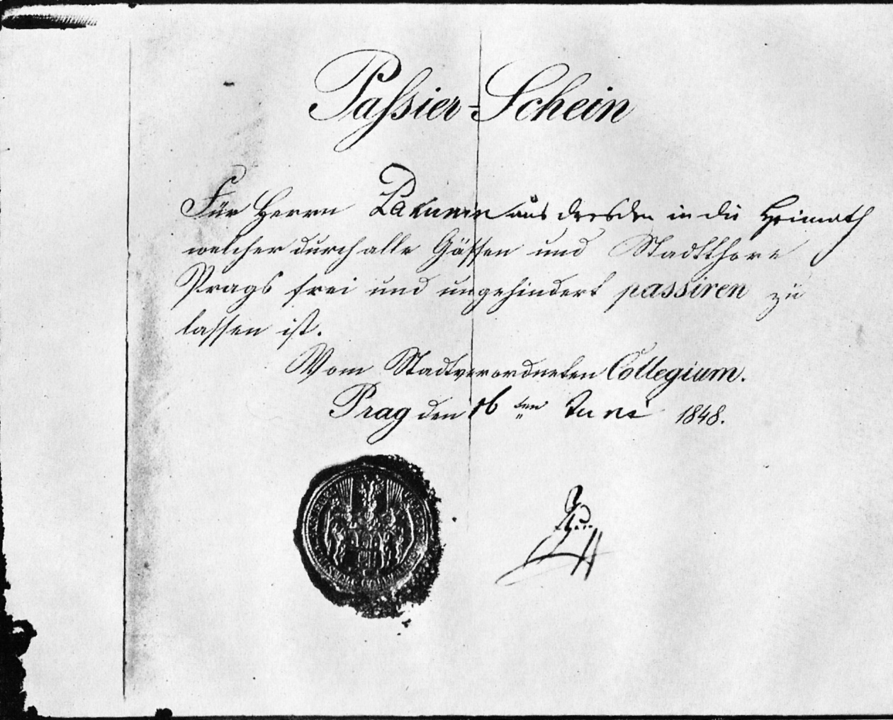 In Prag ausgestellter Passierschein für Michail Bakunin.